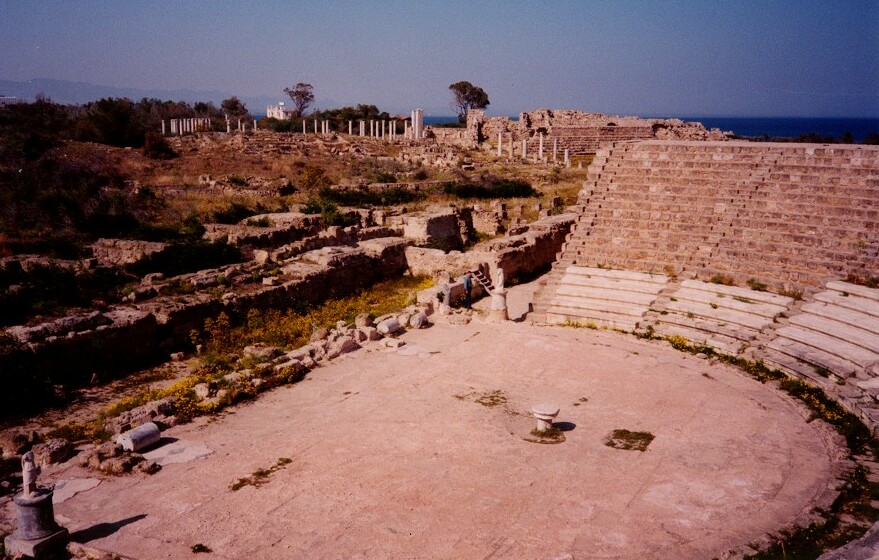 Ruina de Salamis. Anfiteatro. Chipre. Imagen tomada por el cargador. Año 1998.